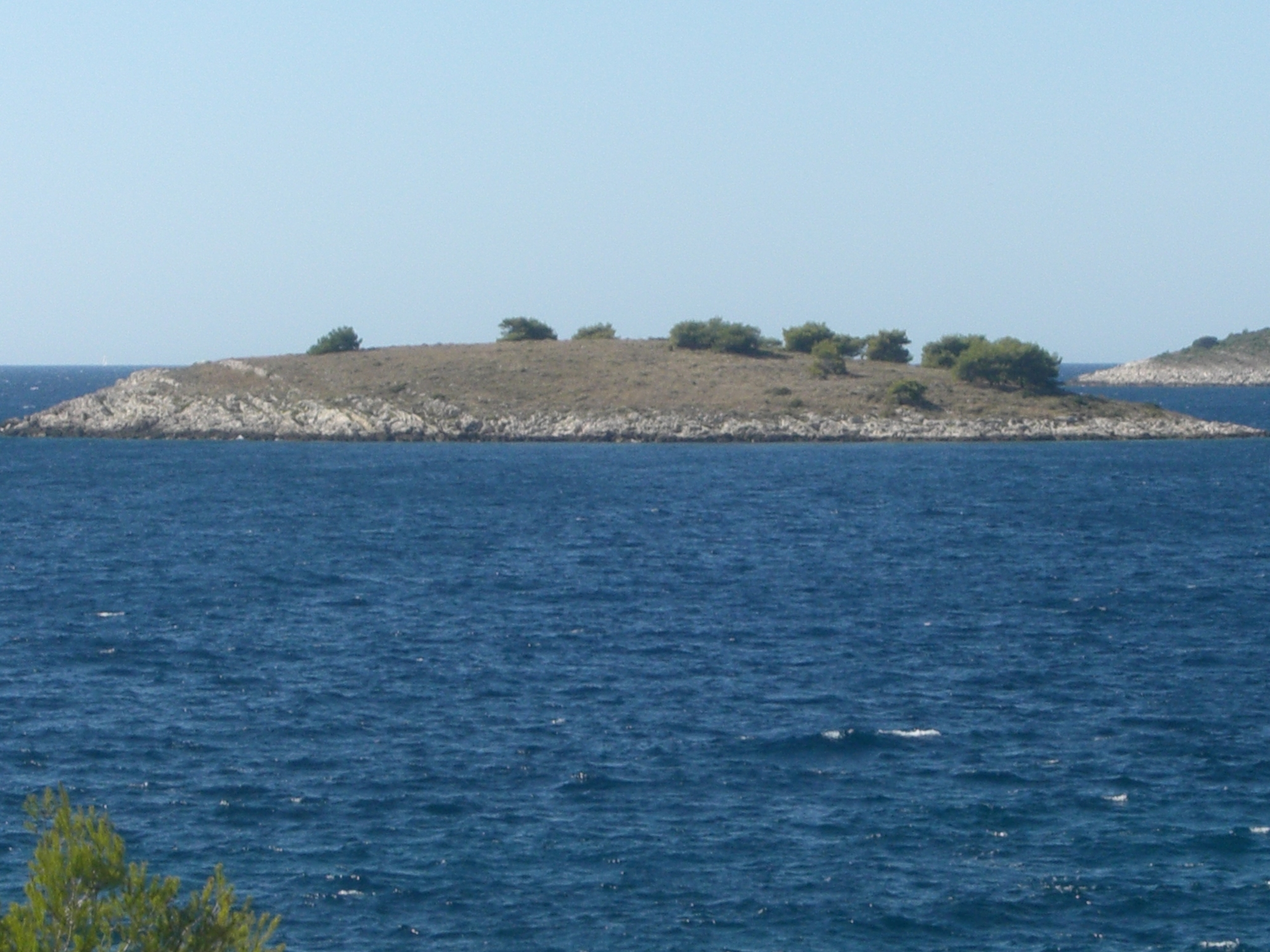 Lukvenjak